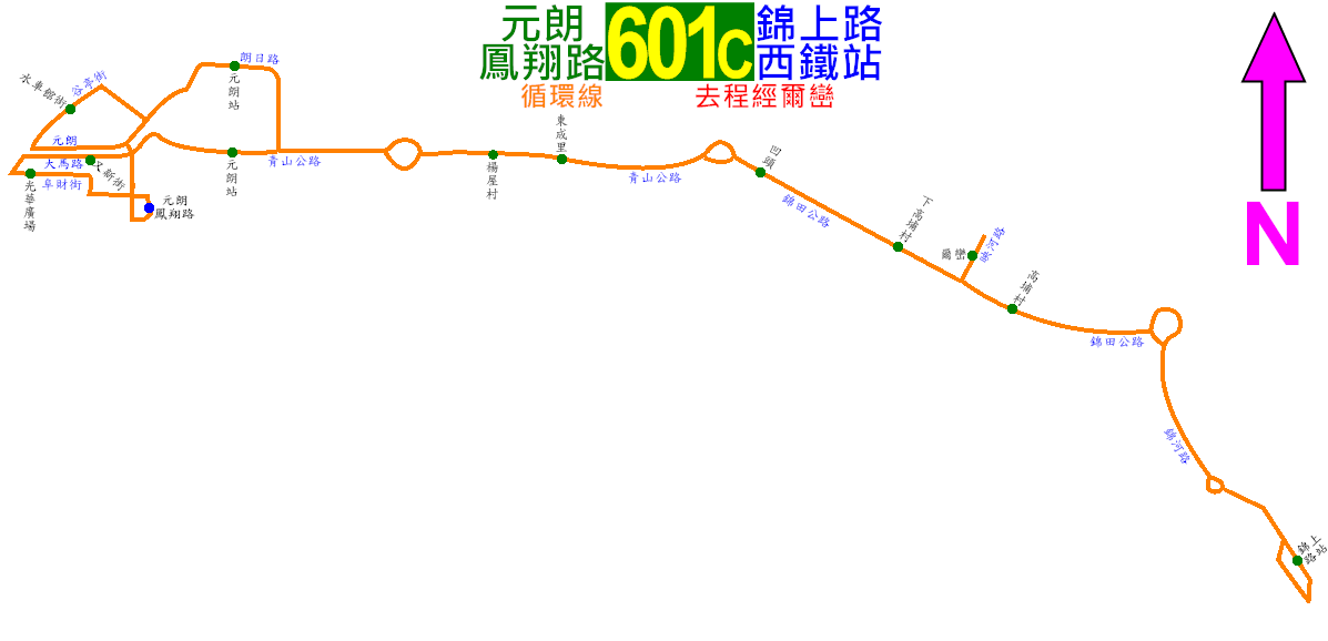 中文（香港）: 新界專線小巴601C線的走線圖